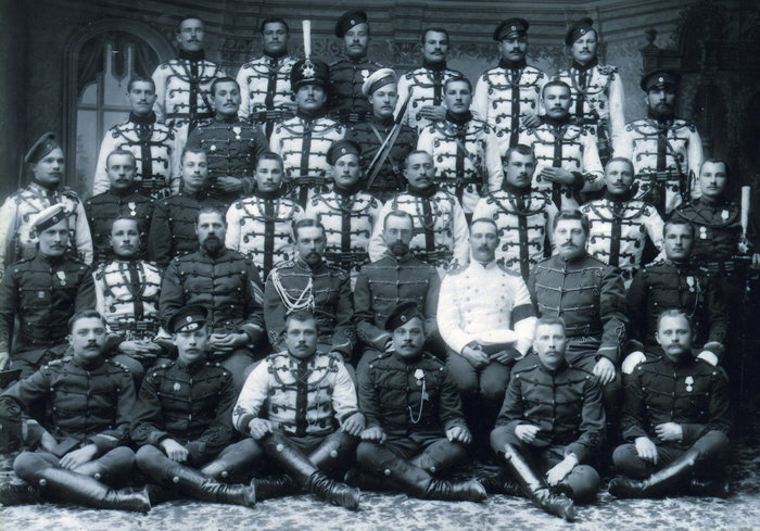 Лейб-гвардии Гусарский полк Его Величества, 2-й эскадрон (1895) г.Царское Село